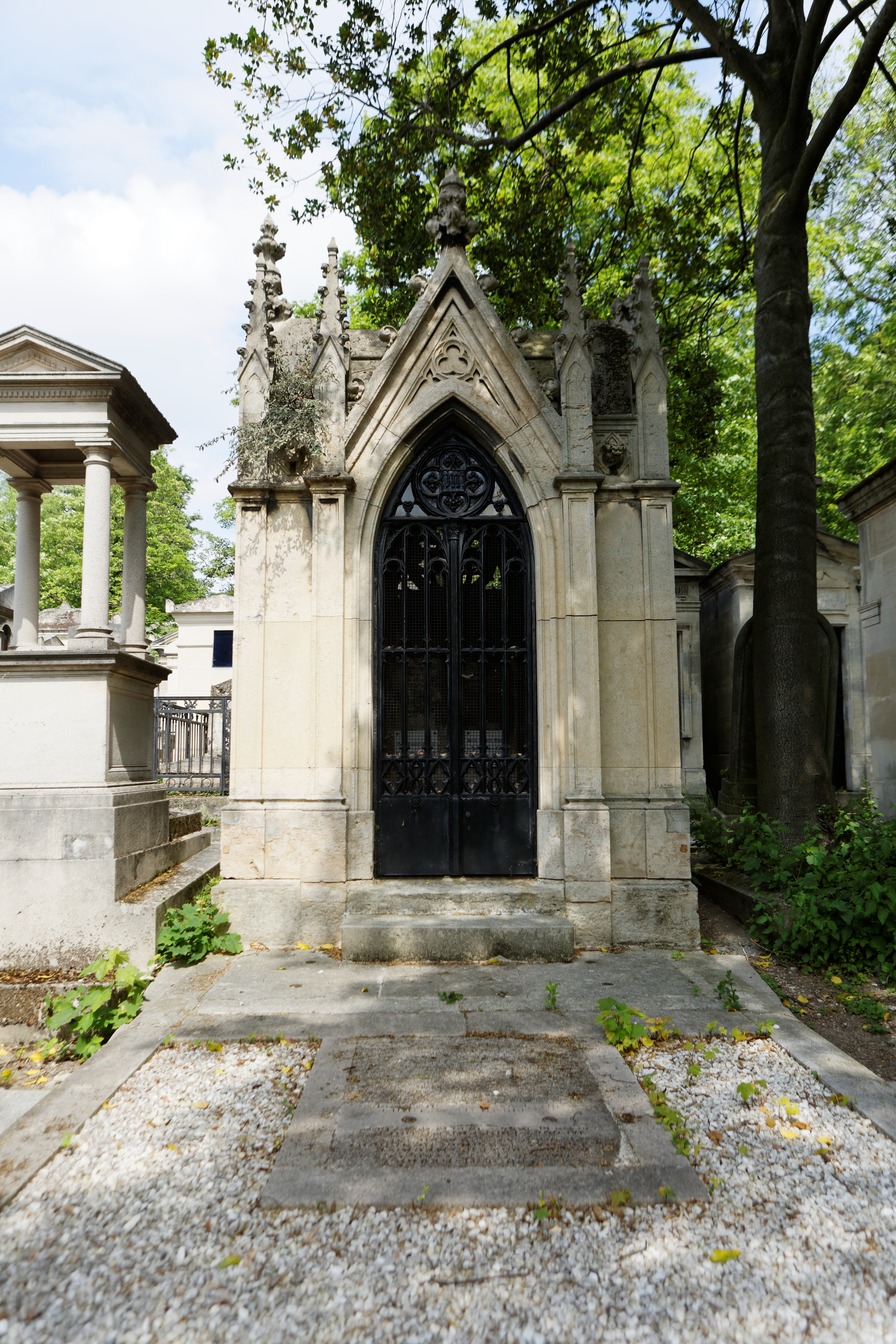 Sépulture de Pierre Meurice (1781-1857) ; François-Désiré Froment-Meurice (1802-1855), orfèvre ; Émile Froment-Meurice (1837-1913), orfèvre ; Jacques Froment-Meurice (1864-1946), sculpteur ; Charles-Pierre Mahler (1825-1884), substitut du procureur ; Pierre Mahler (1860-1935), ingénieur civil des Mines.